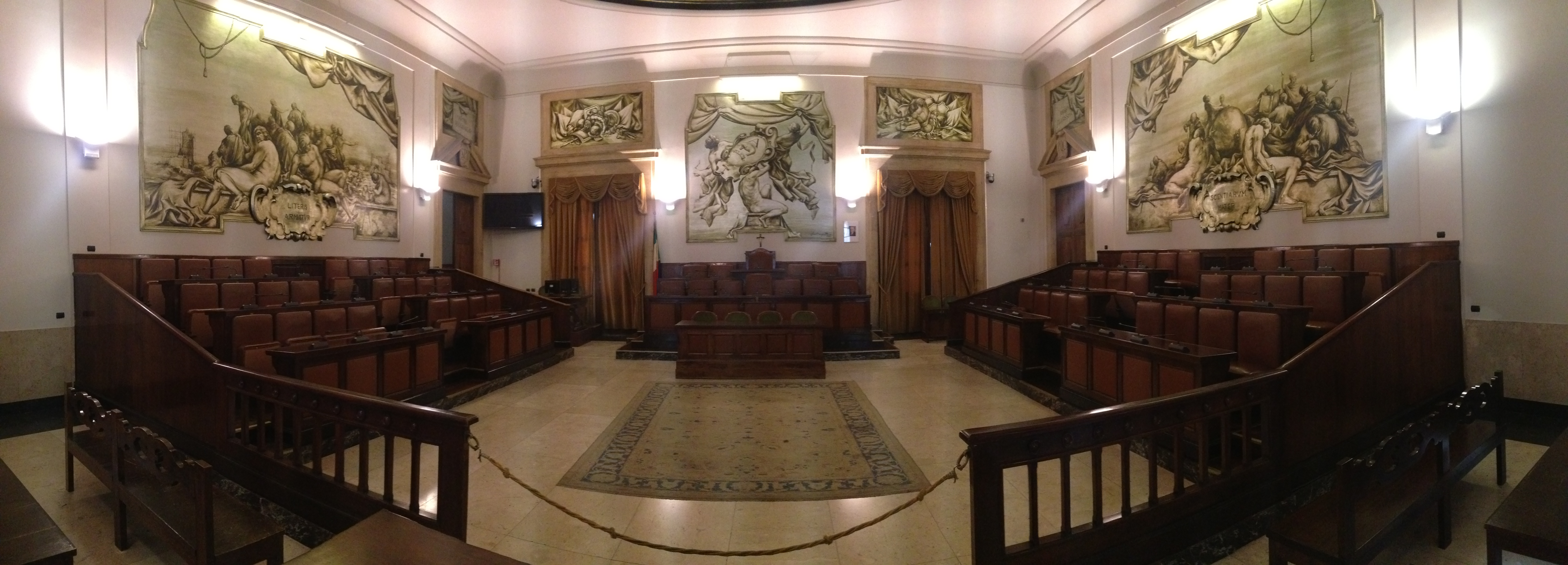 Sala del consiglio comunale